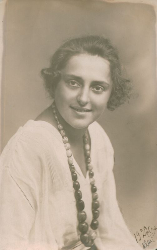 Elena Žalinkevičaitė-Petrauskienė (1900 m. rugsėjo 23 d. Padustėlis, Dusetų valsčius, Rusijos imperija – 1986 m. gegužės 23 d. Vilnius) – aktorė, poetė, dramaturgė.